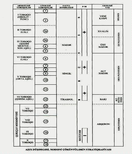 Azıx (Azox) mağarasının təbəqələri